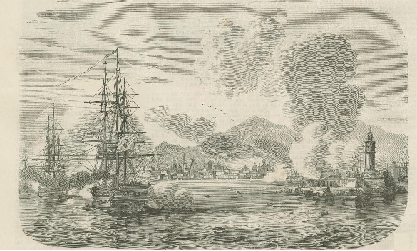 Ferdinando Lanza, generale borbonico, fa bombardare Palermo all'arrivo di Garibaldi, 1860